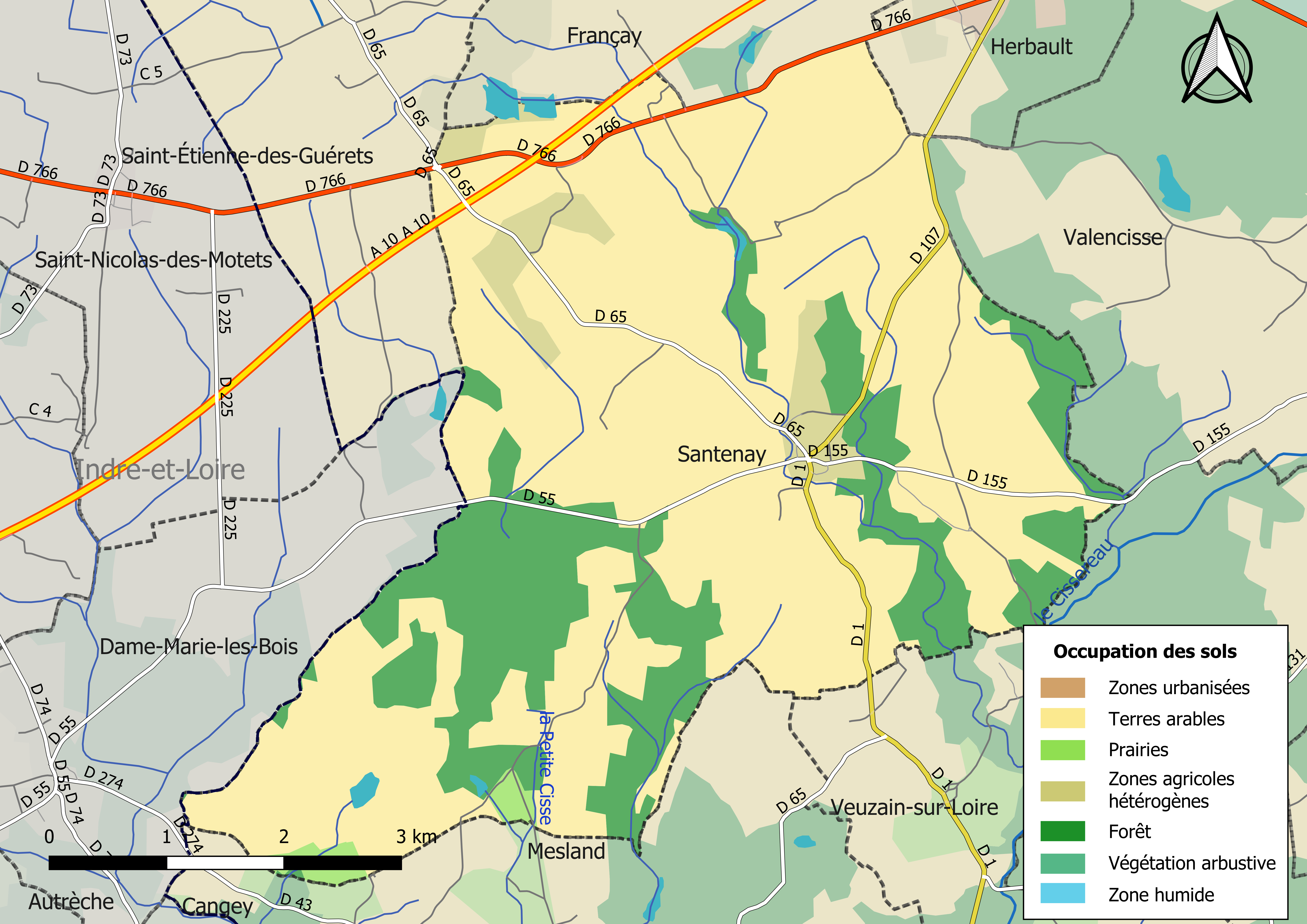 Carte des infrastructures et de l’occupation des sols en 2018 de la commune de Santenay (Loir-et-Cher) (France).